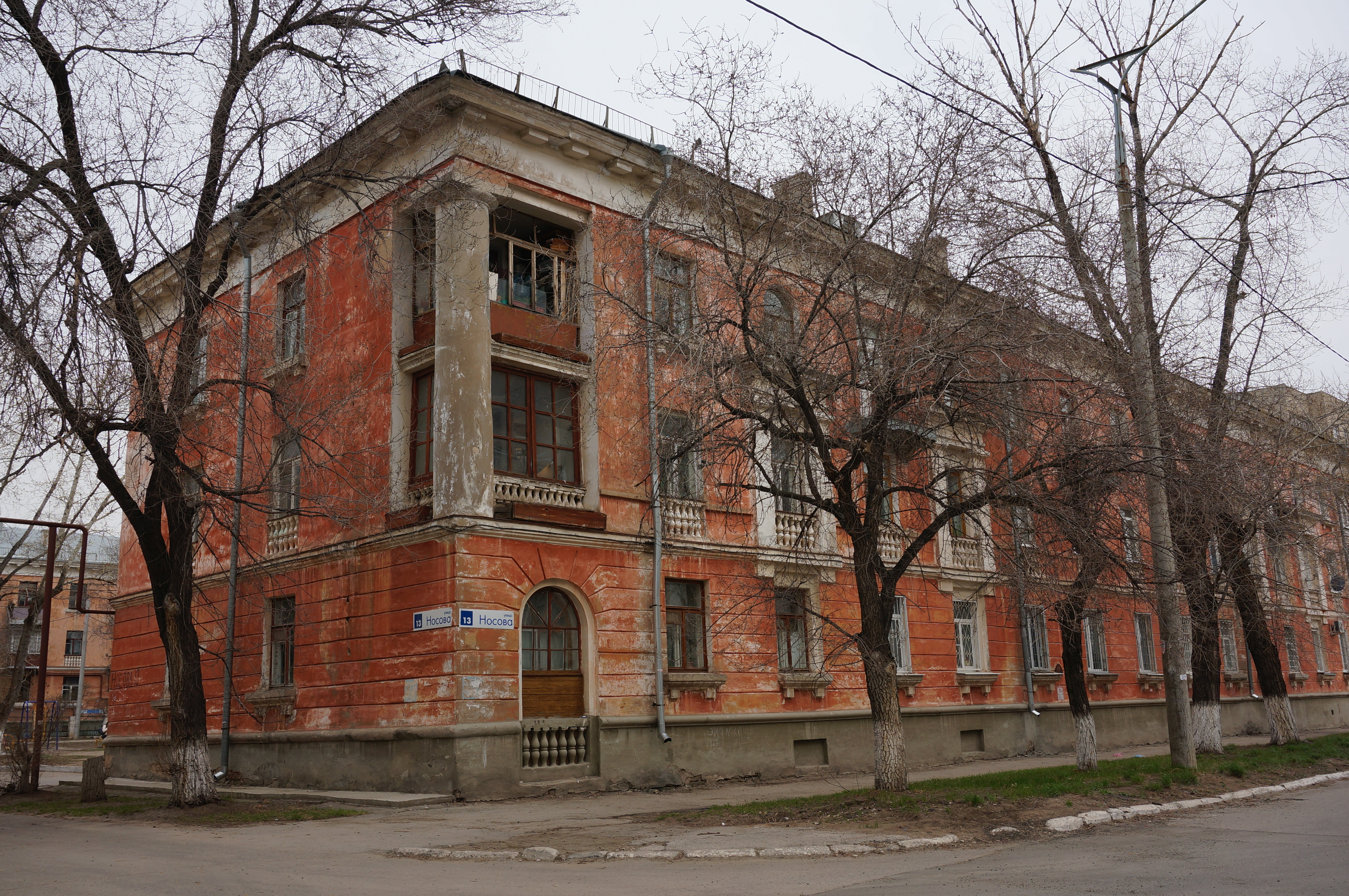 Ул. Носова 13, Тольятти, Россия. Жилой трёхэтажный дом на 24 квартиры. Проект разработан институтом Ленгипрогор, строительство велось с 1954 по 1957 год. Архитекторами выступили И. Г. Ромм, Е. А. Юзбашева, В. Мухин, заказчиками — дирекция строительства порта и судоремзавода.